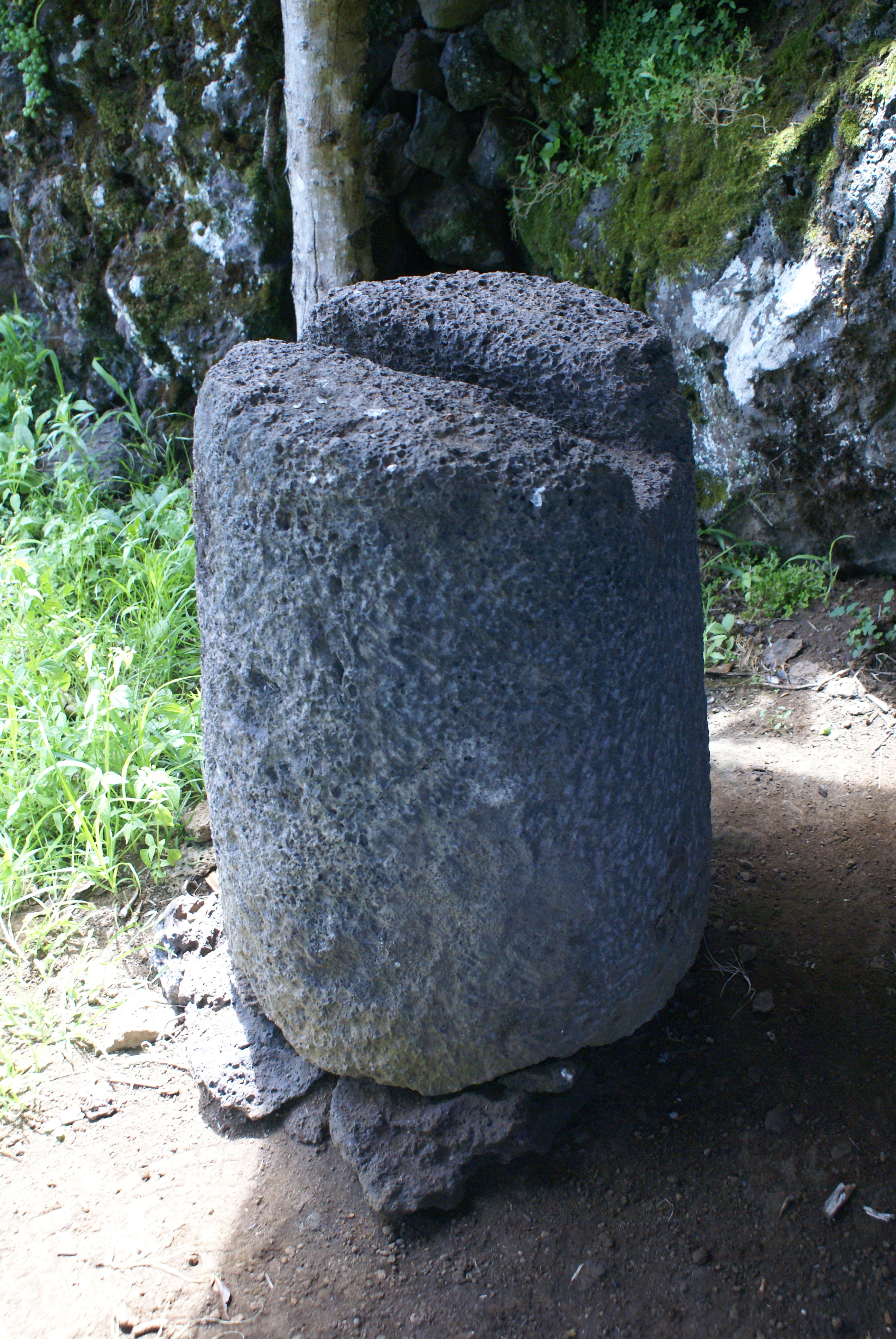 Antiquíssima pedra de lagar em cantaria, pertencente a João dos Santos Bettencourt, Fajã do Meio, Velas, ilha de São Jorge